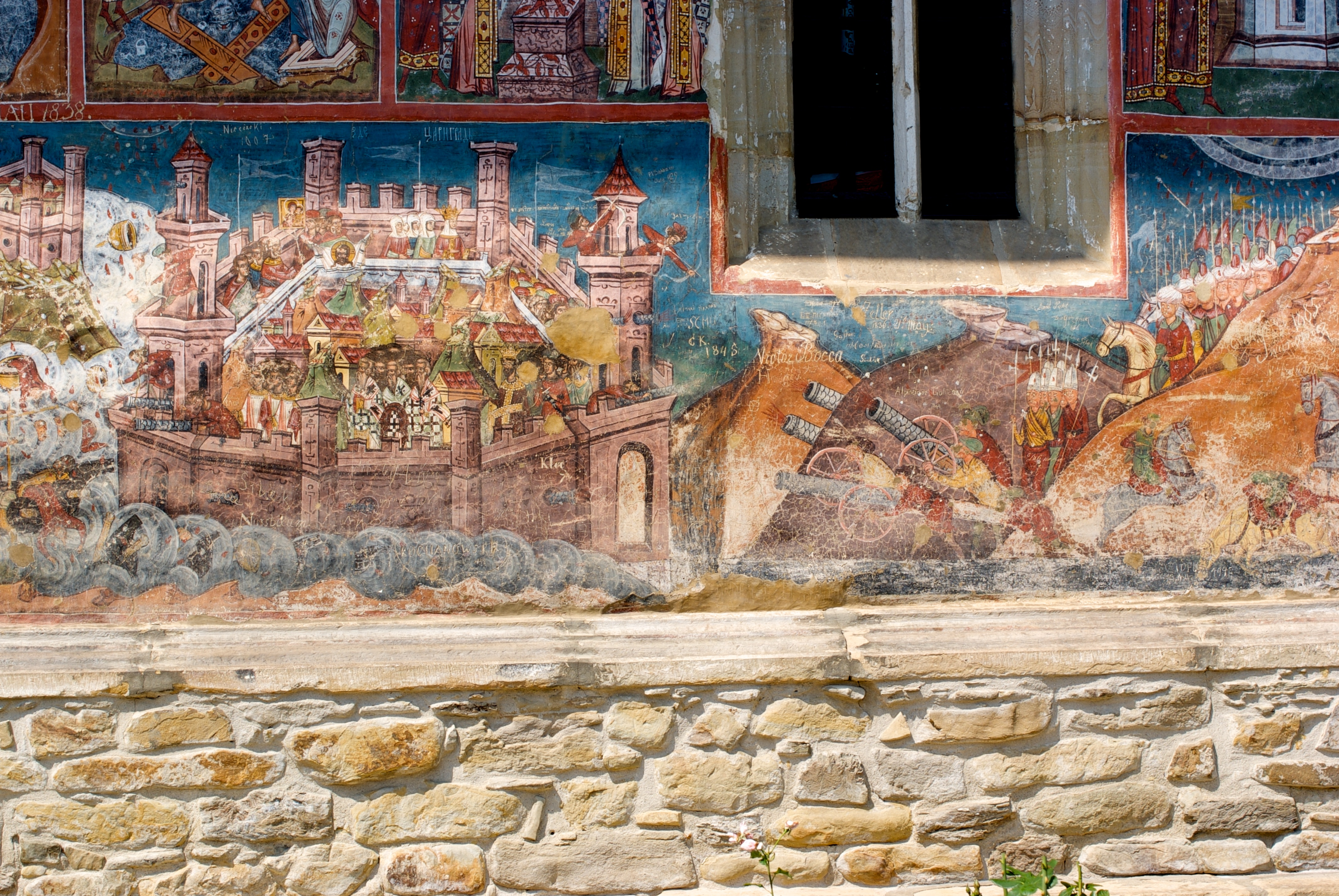 Darstellung der Belagerung Konstantinopels an der Südfassade an der Kirche des Kloster Moldovița